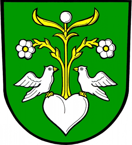 znak, Milenov, okres Přerov